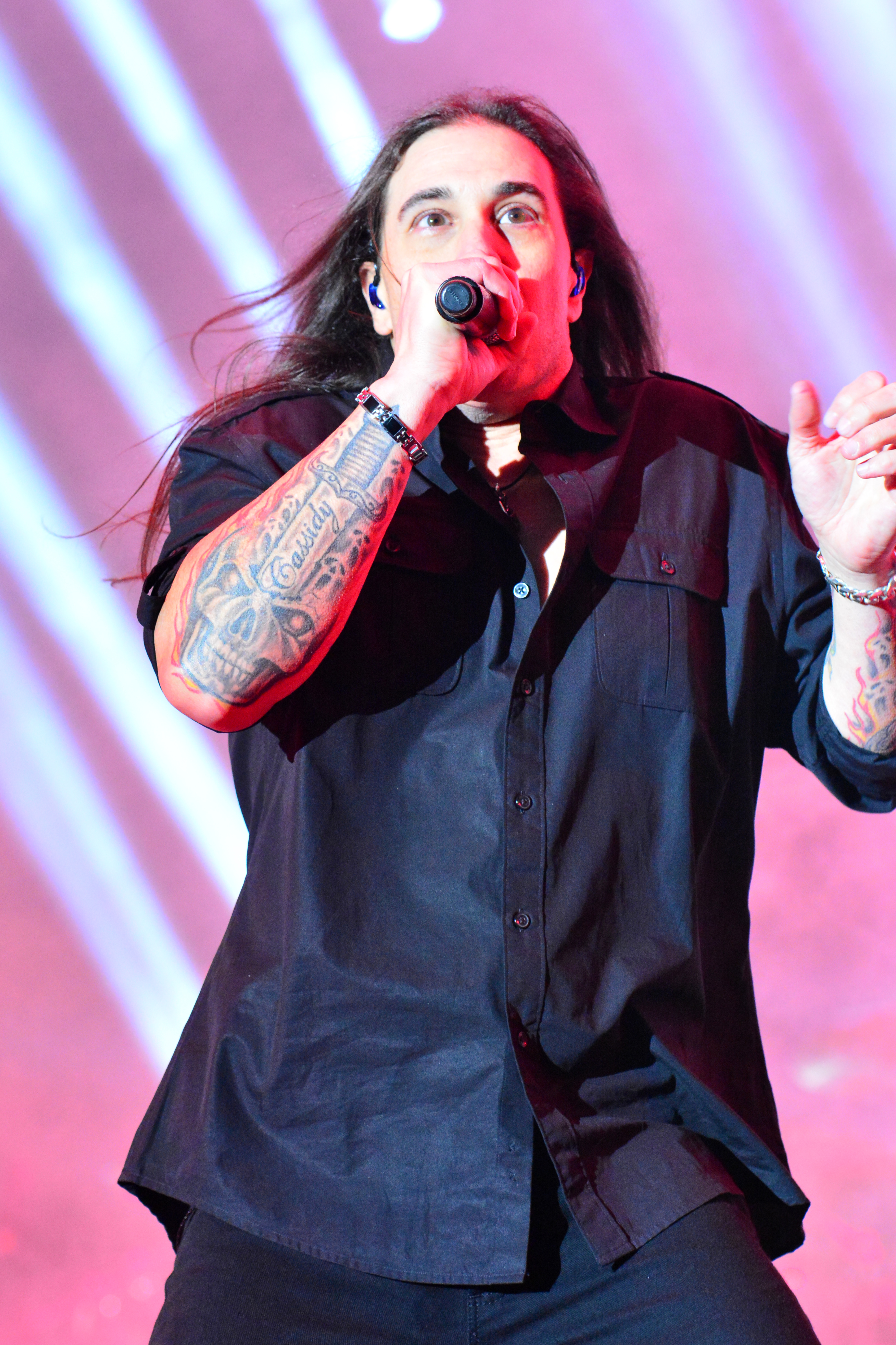 Savatage beim Wacken Open Air 2015